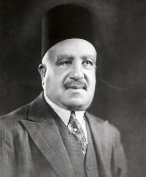 Talaat Pasha Harb (1876-1941)